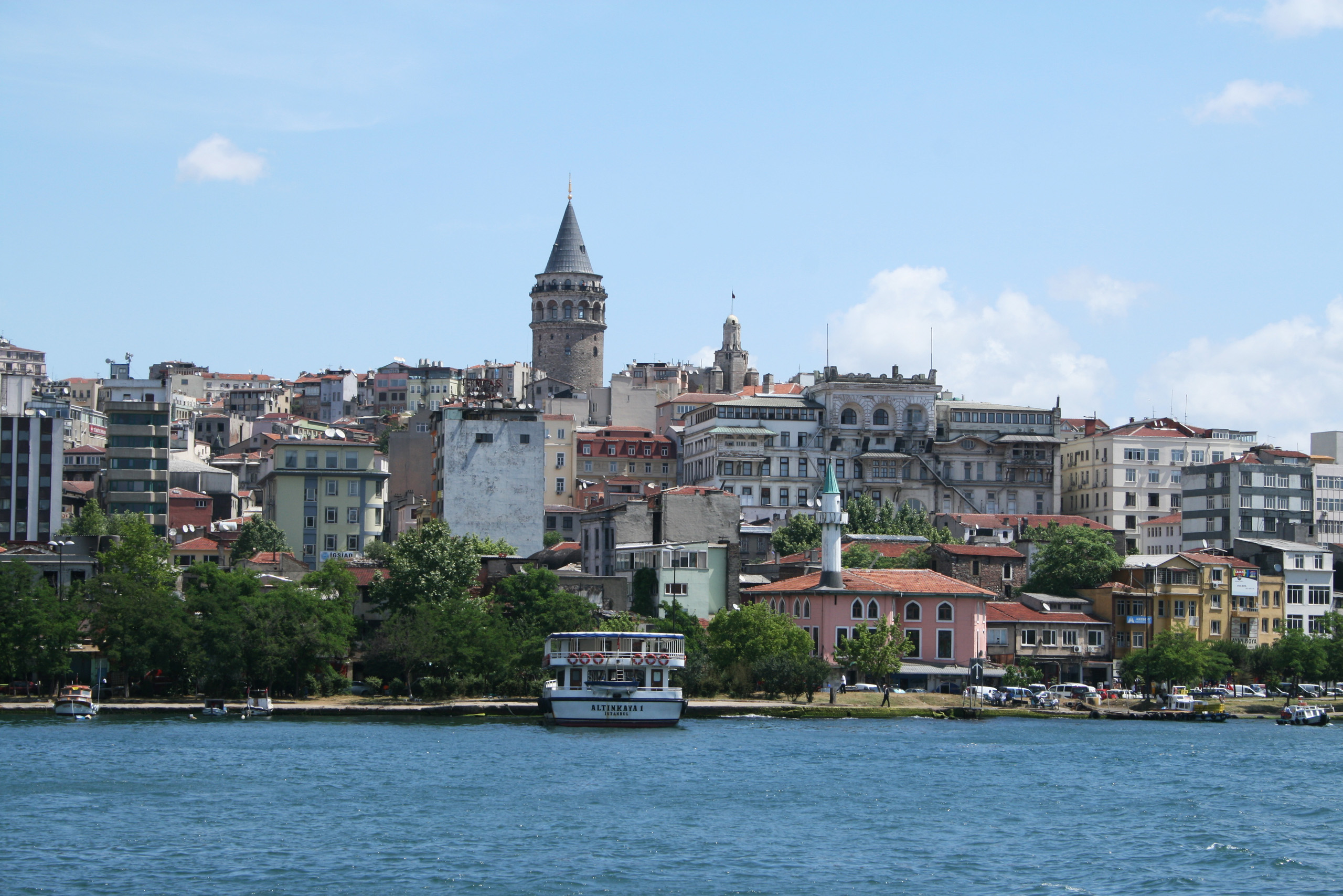 La tour Galata à Istamboul